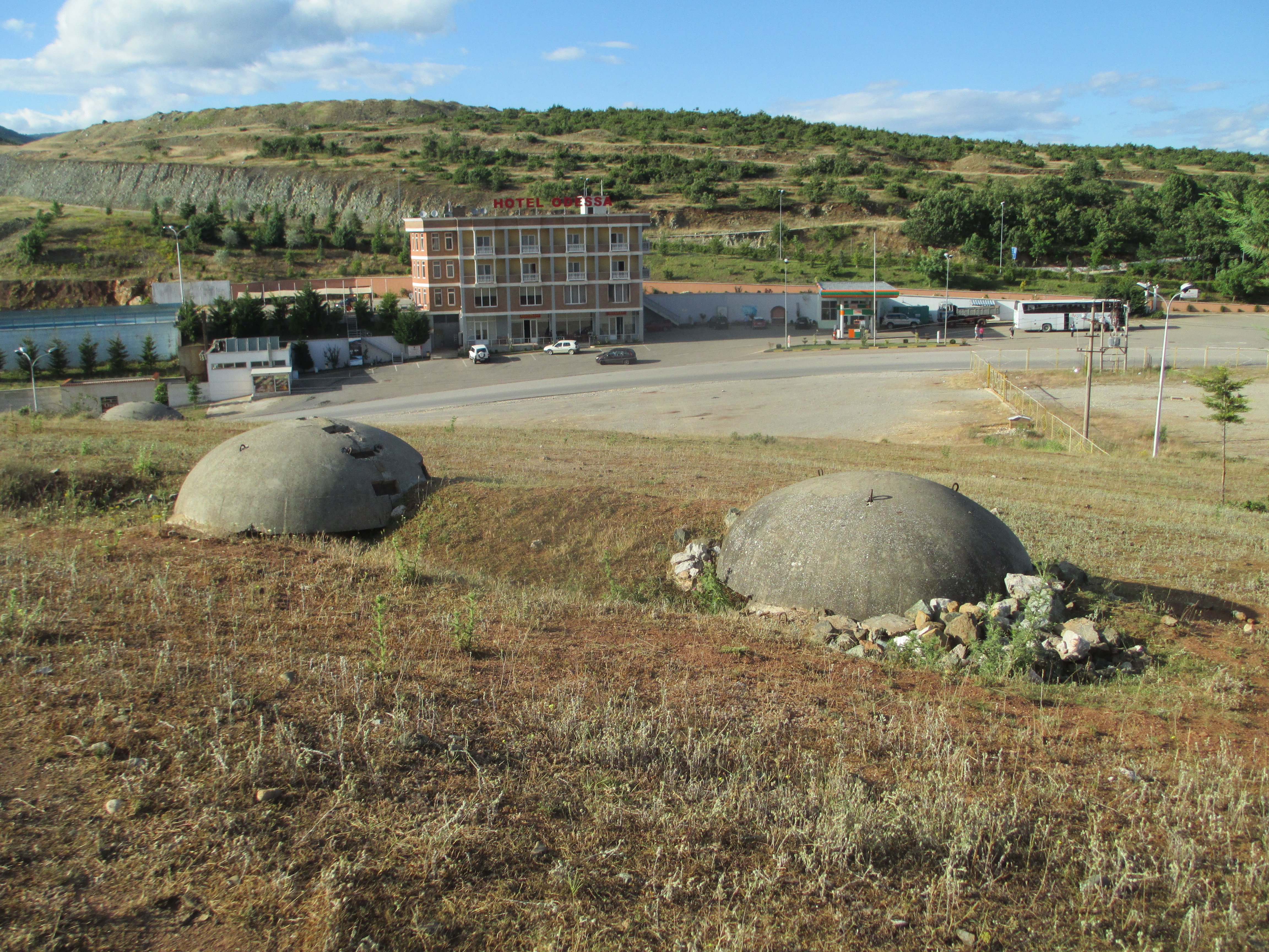 בונקרים באלבניה, בגבול מקדוניה